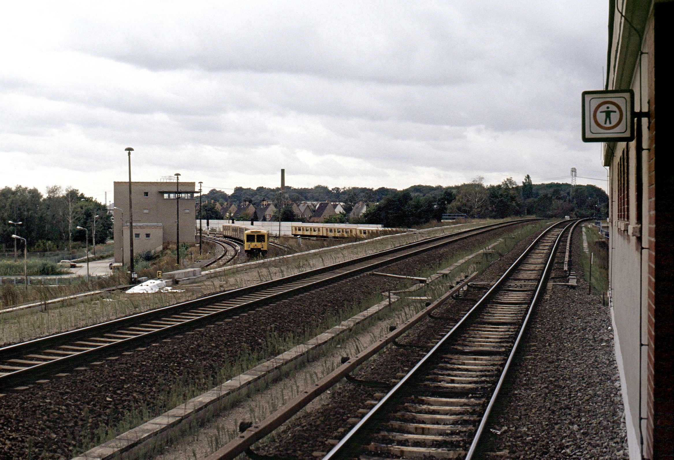 Verbindungsgleise U-Bahn / Eisenbahn in Wuhletal